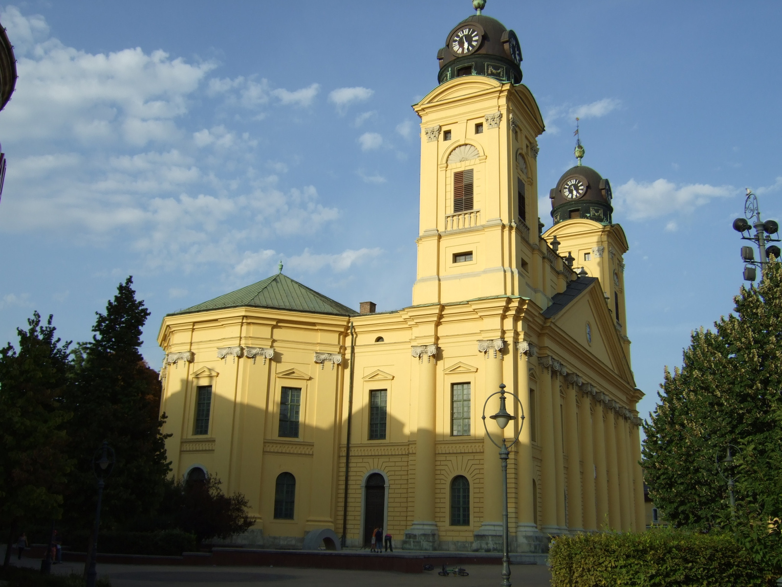 Ref. Nagytemplom (Debrecen, Kálvin tér) This is a photo of a monument in Hungary. Identifier: 5233